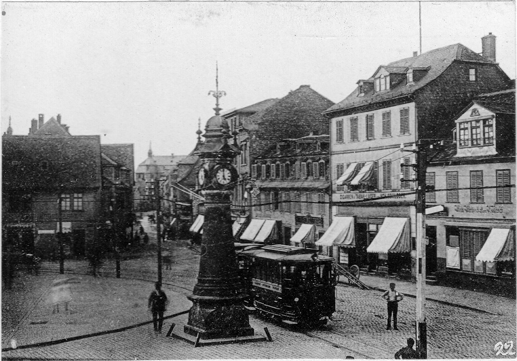 Offenbach Marktplatz Nordansicht